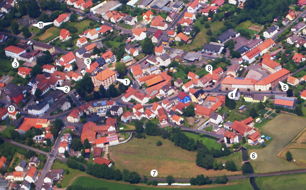 Ortskern Eichenzell, Gemeinde im Landkreis Fulda in Hessen, Deutschland.